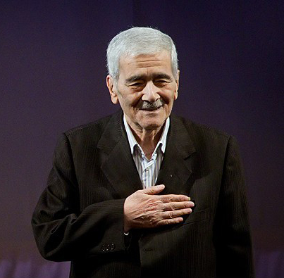 منصور نریمان اختتامیه بیست و هشتمین جشنواره موسیقی فجر ۲ اسفند ۱۳۹۱